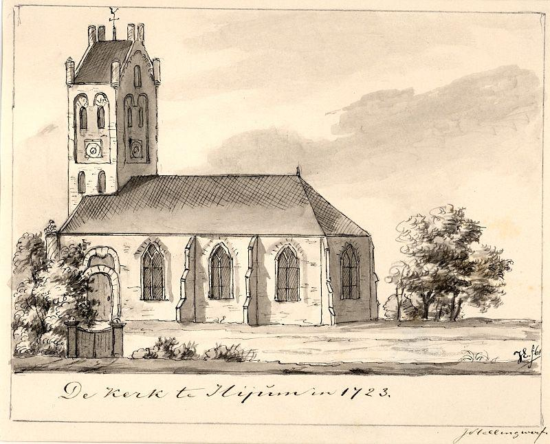 De tsjerke fan Hijum yn 1723.